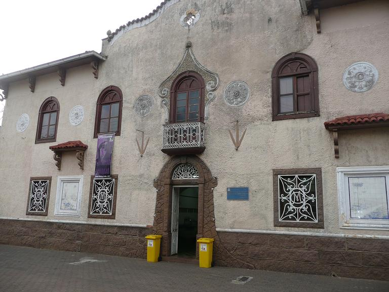 Aspecto do atual Museu histórico de Itapetininga, anteriormente o prédio já abrigou a sede da Prefeitura Municipal de Itapetininga, Câmara de Vereadores, sendo que inicialmente foi projetado para abrigar a Cadeia.